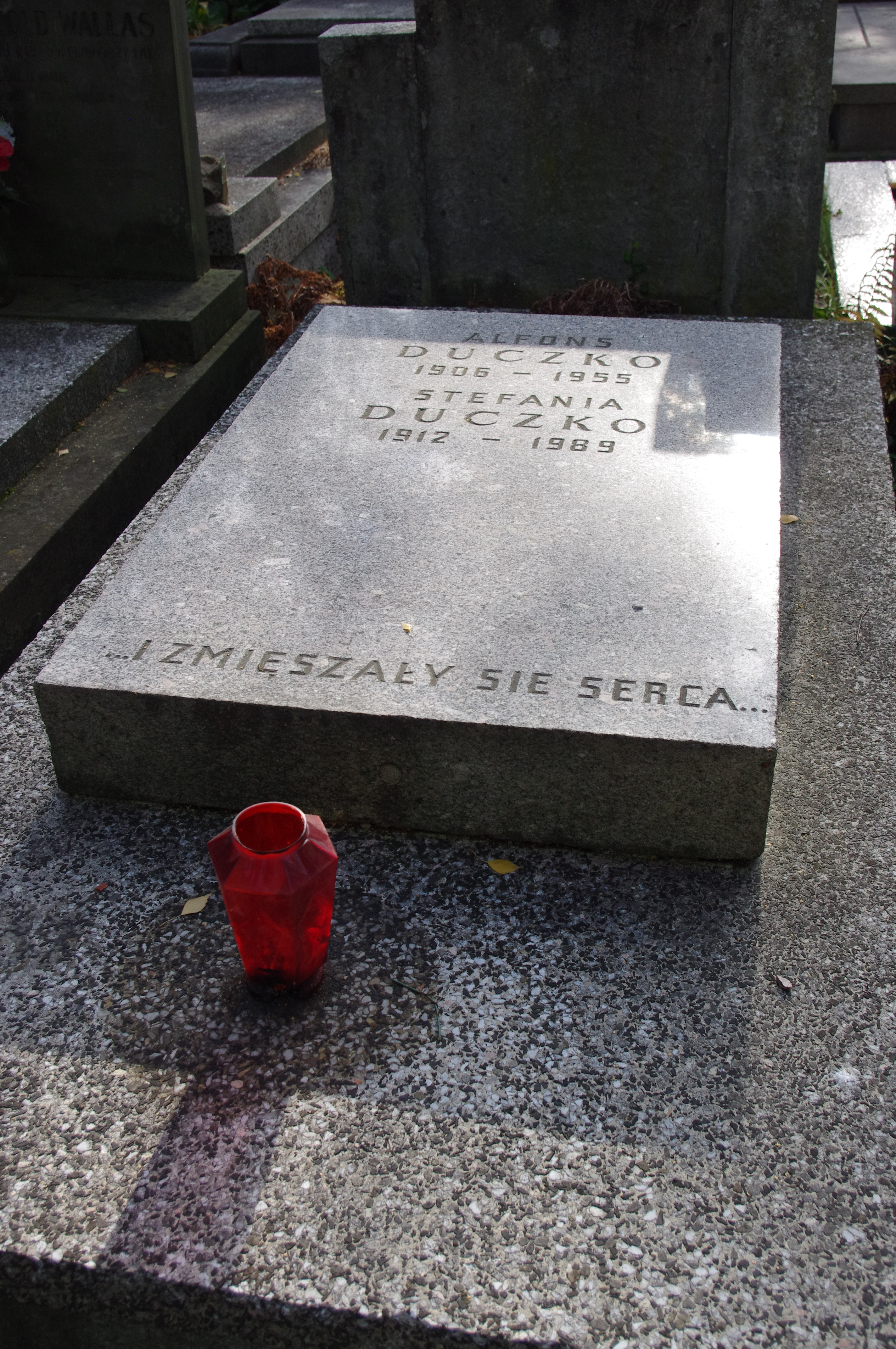 Grób działacza komunistycznego Alfonsa Duczko na Cmentarzu Wojskowym na Powązkach w Warszawie